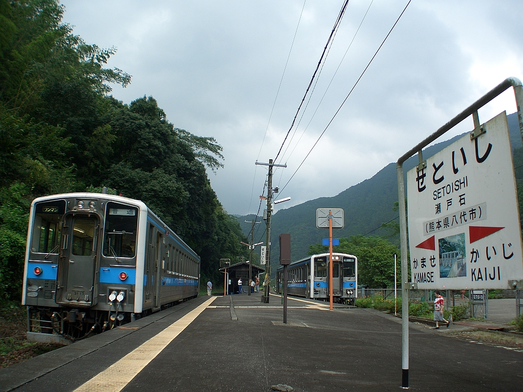 撮影：takasunrise0921